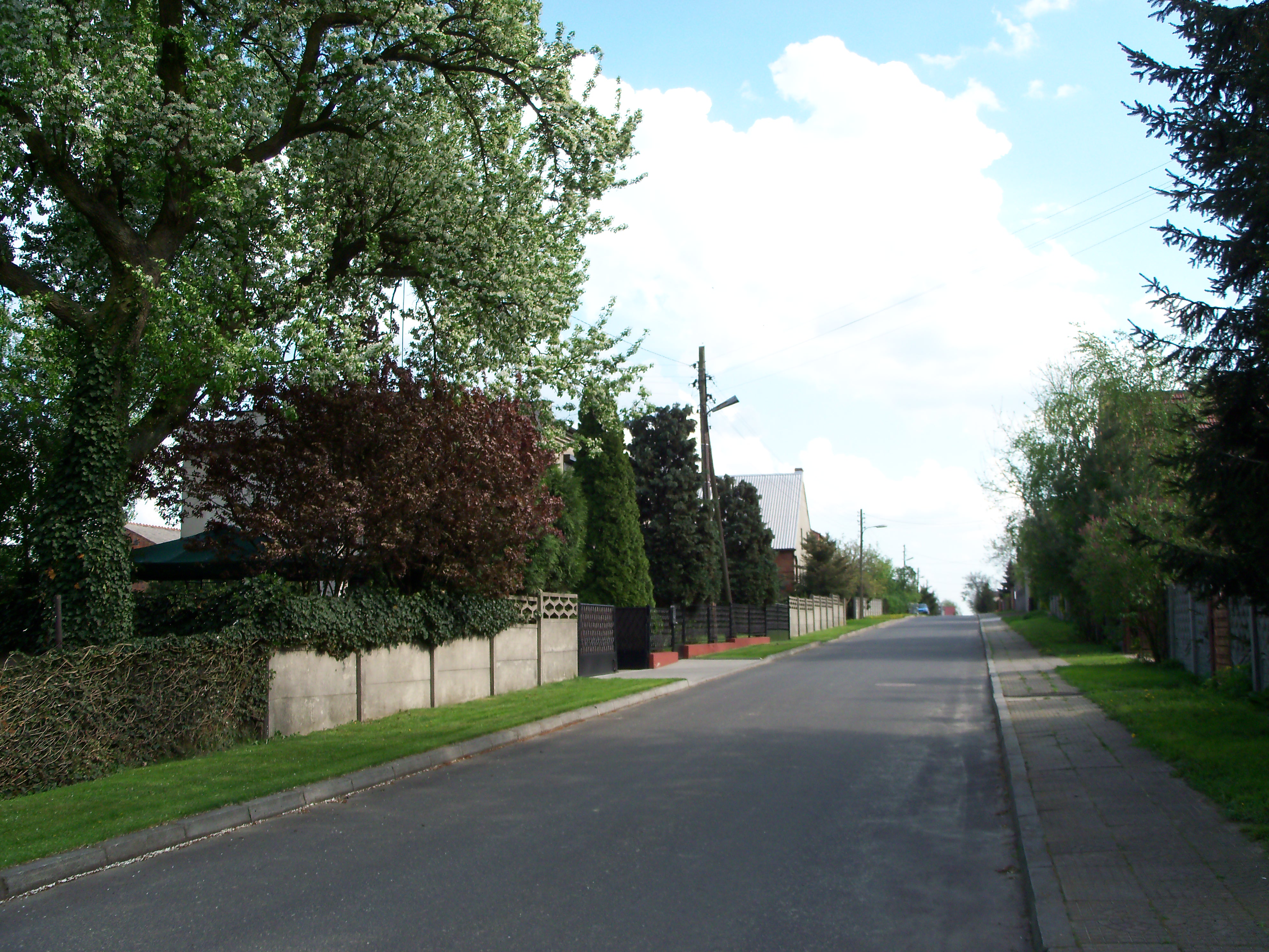 Durzyn